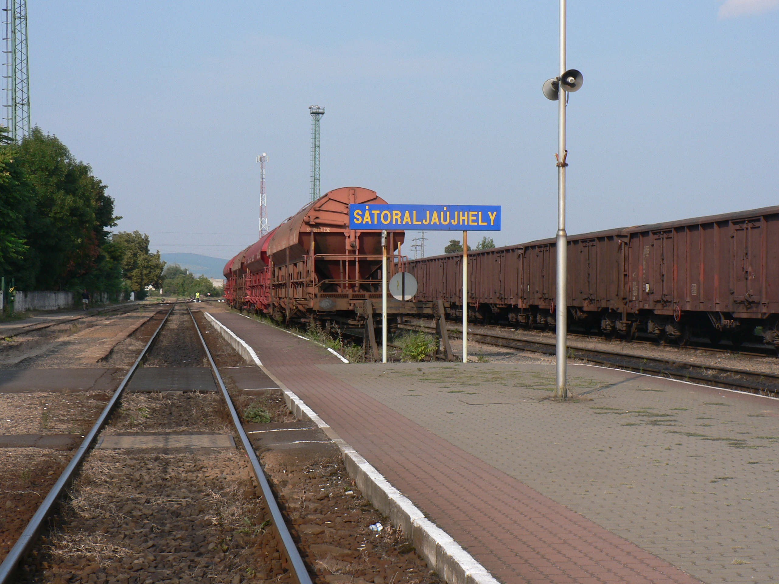 Dworzec kolejowy w Sátoraljaujhély